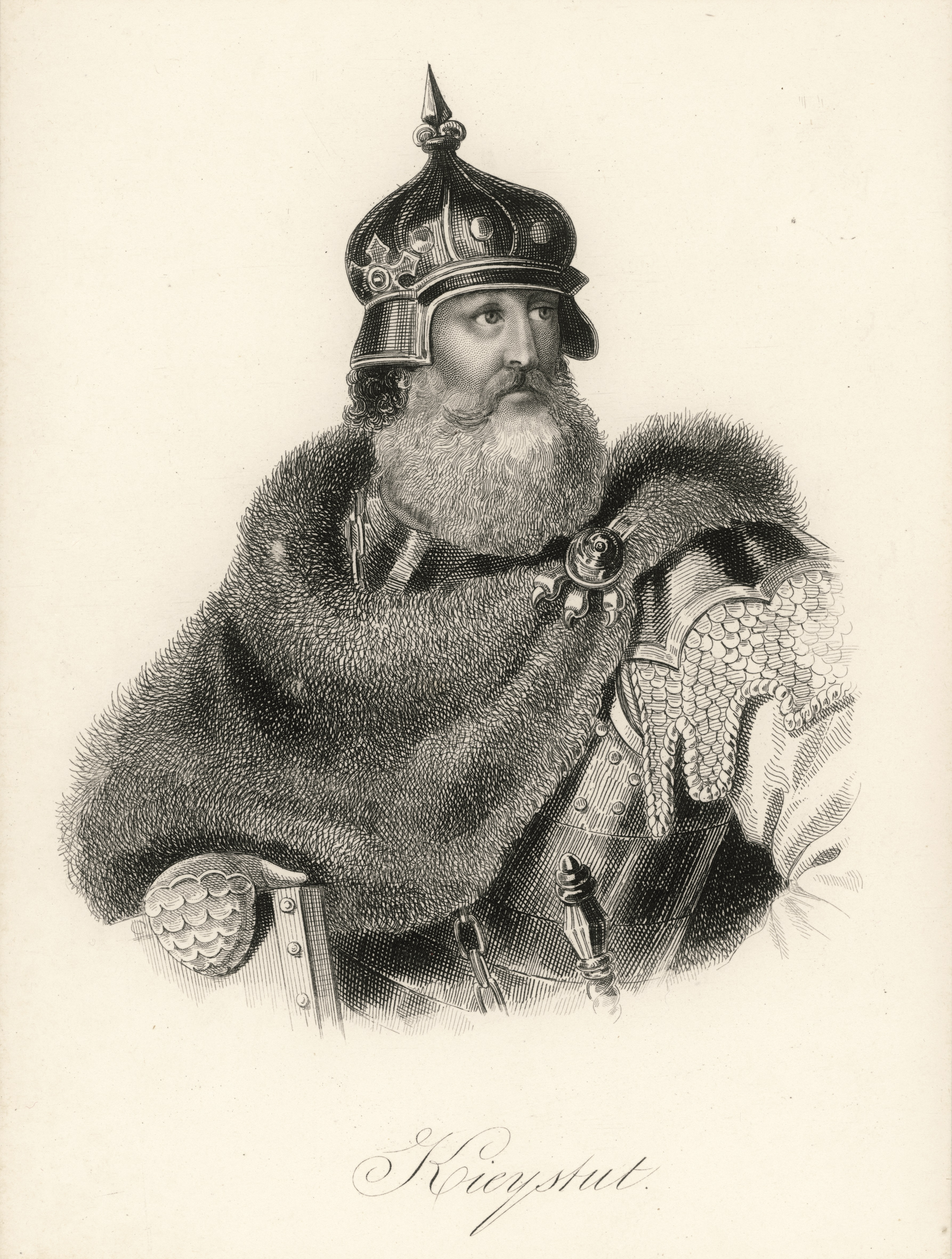 Беларуская (тарашкевіца): Партрэт вялікага князя Кейстута (Kiejstut)